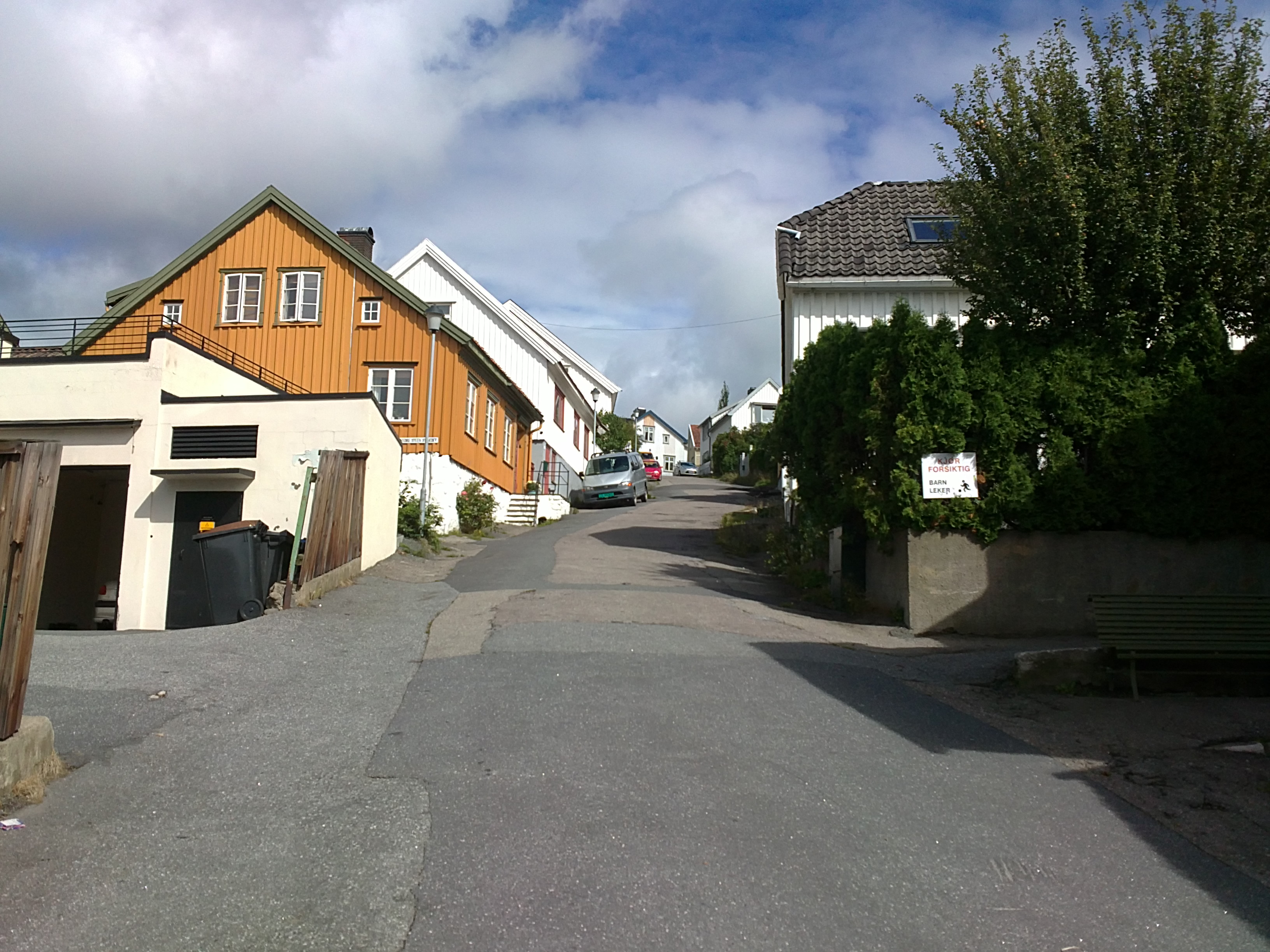 Bilde av Steingata, Larvik